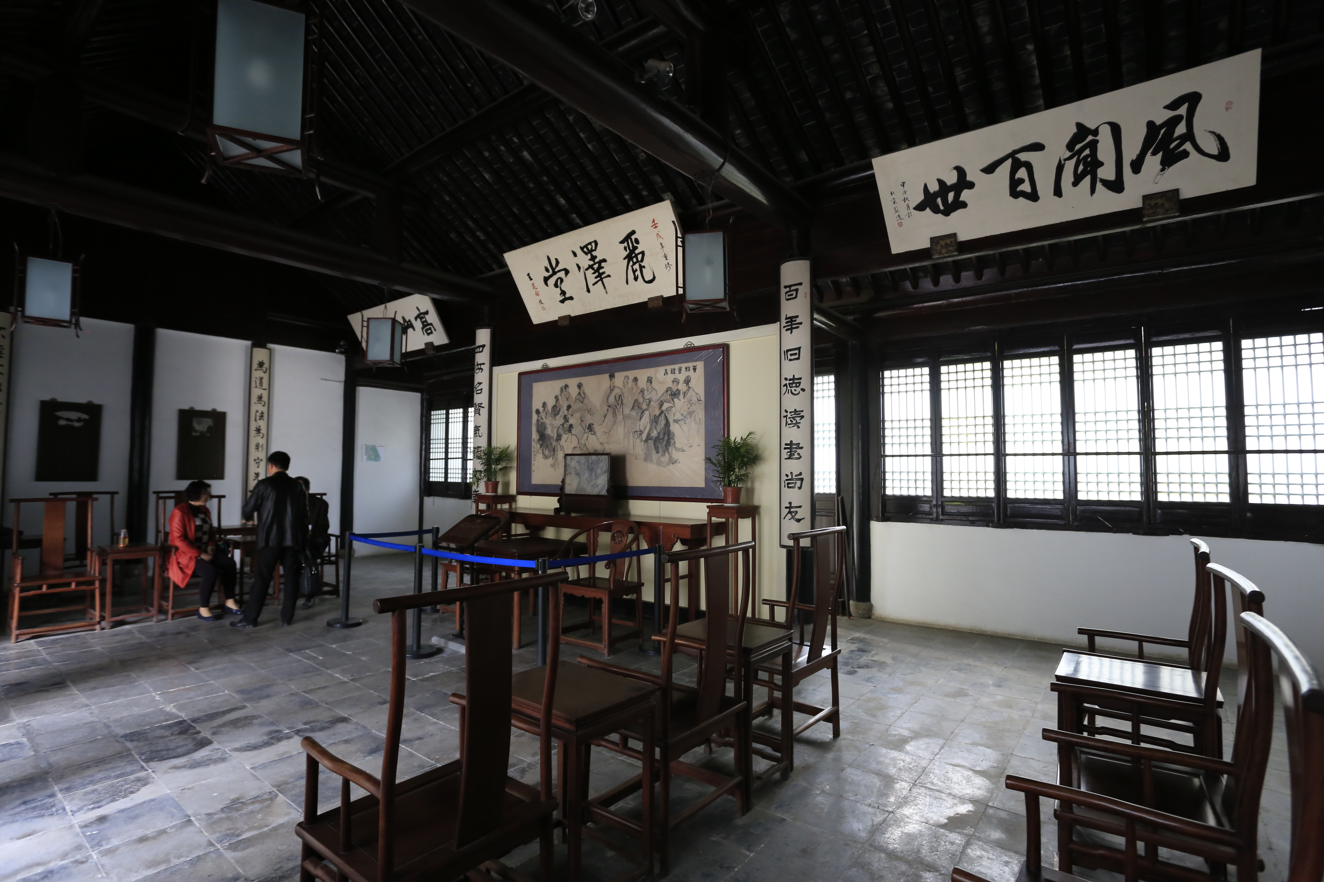 无锡东林书院 丽泽堂